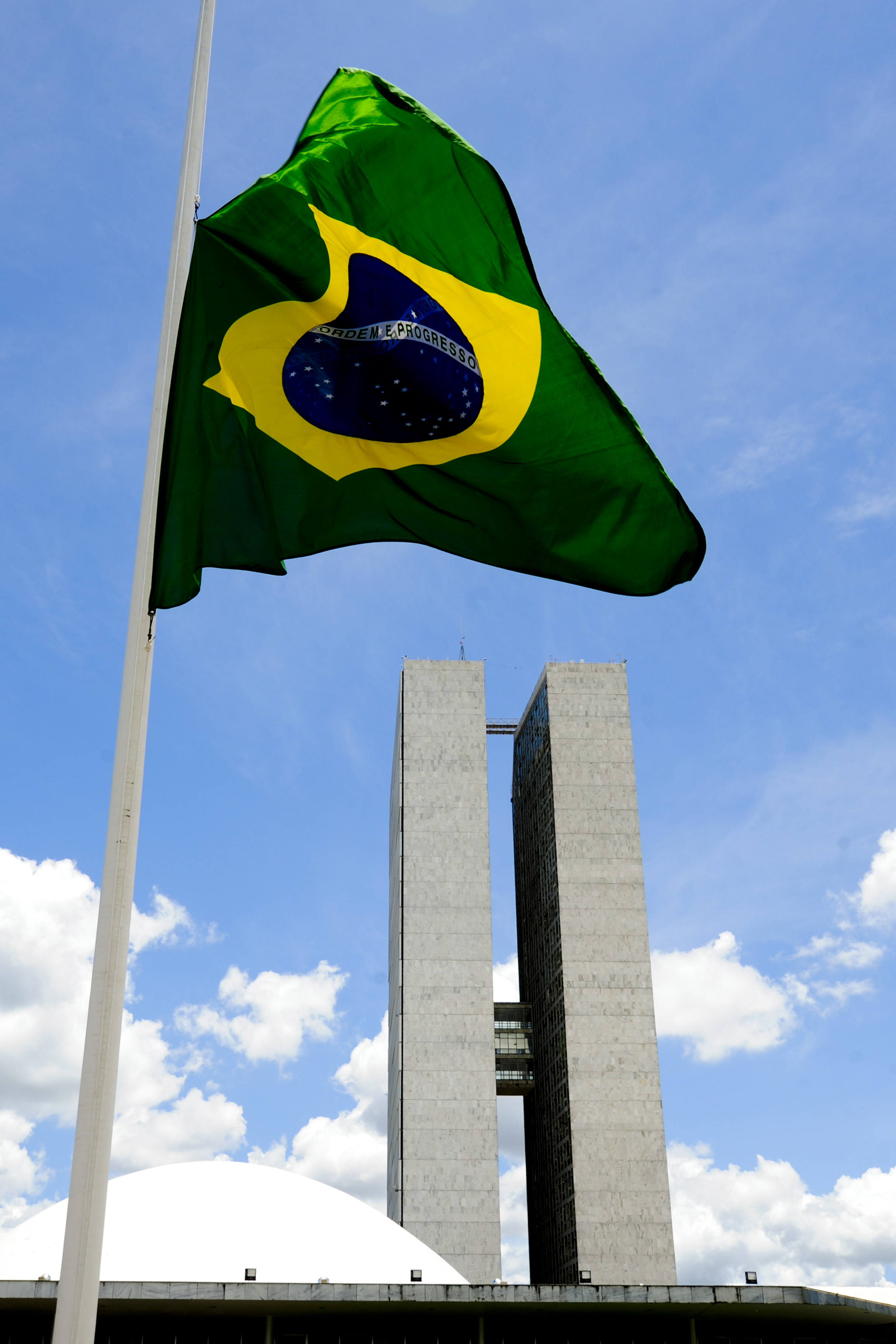 Devido a tragédia com o avião que transportava equipe da Chapecoense cair na Colômbia, bandeiras do Brasil e do Mercosul foram içadas a meio mastro diante do Congresso Nacional. Foto: Geraldo Magela/Agência Senado